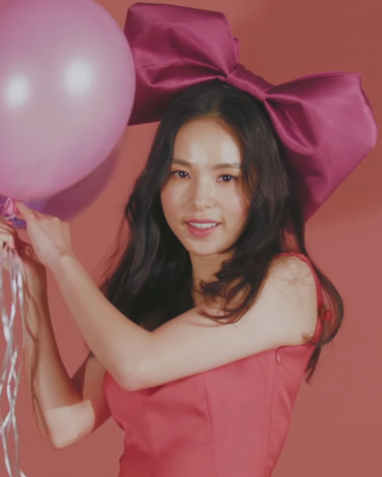 Marie Claire Korea 민효린의 홀리데이 파티